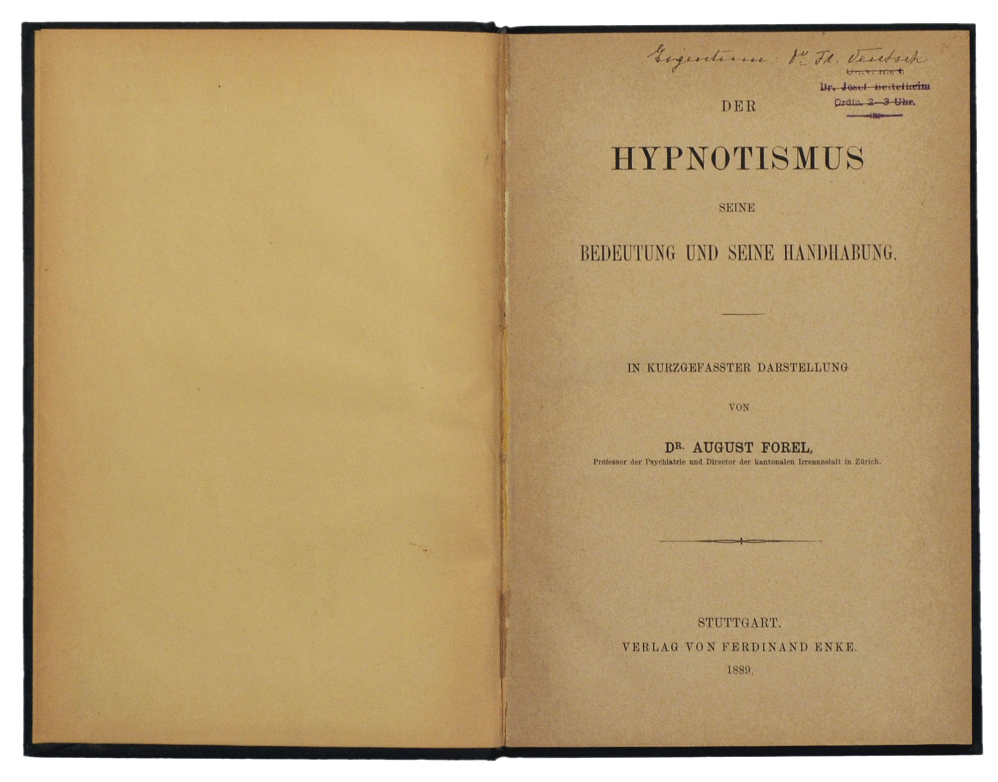 Forel, A.: Der Hypnotismus. Seine Bedeutung und seine Handhabung oder der Seelenstörungen und ihrer Behandlung. Stuttgart: F. Enke 1889. Erstdruck.